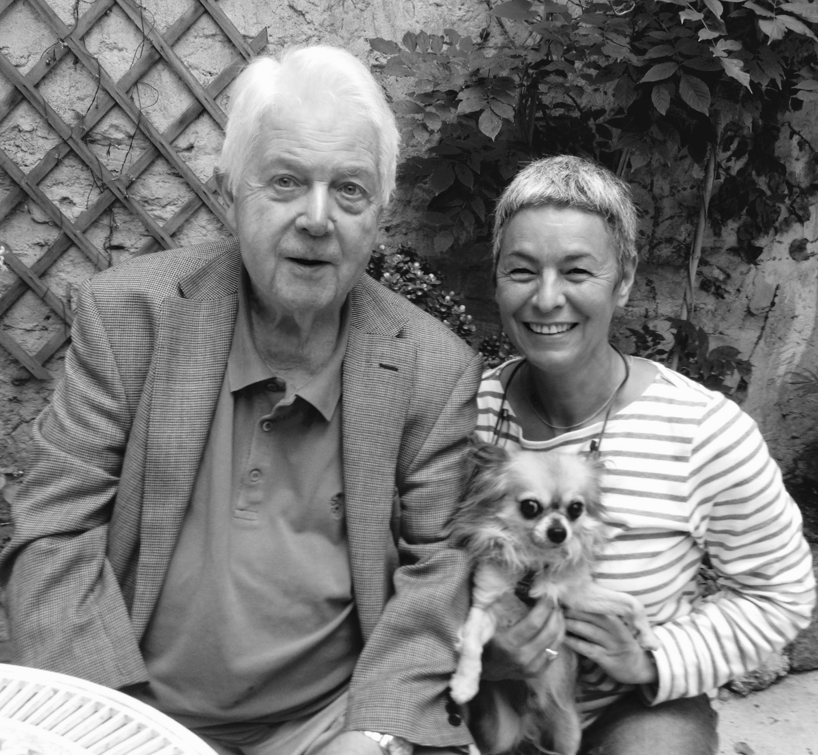 J-F Jaeger